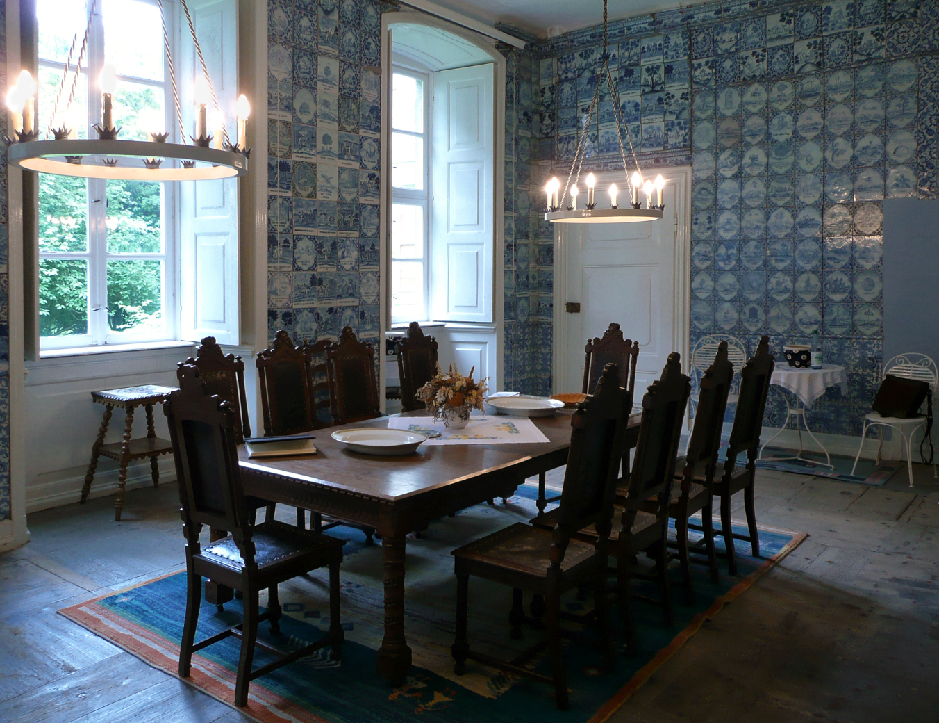 Fliesenzimmer in Schloss Wrisbergholzen